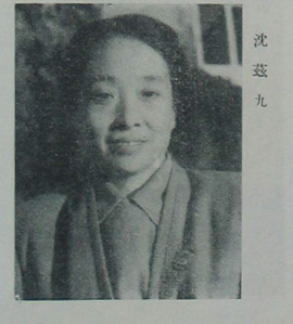 中文（台灣）: 中國人民政治協商會議第一屆全體會議代表